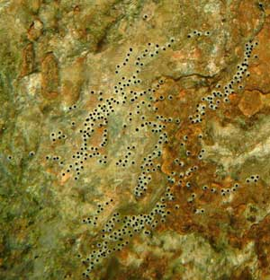 380 oeufs de Variabilichromis pondus sur substrat découvert.